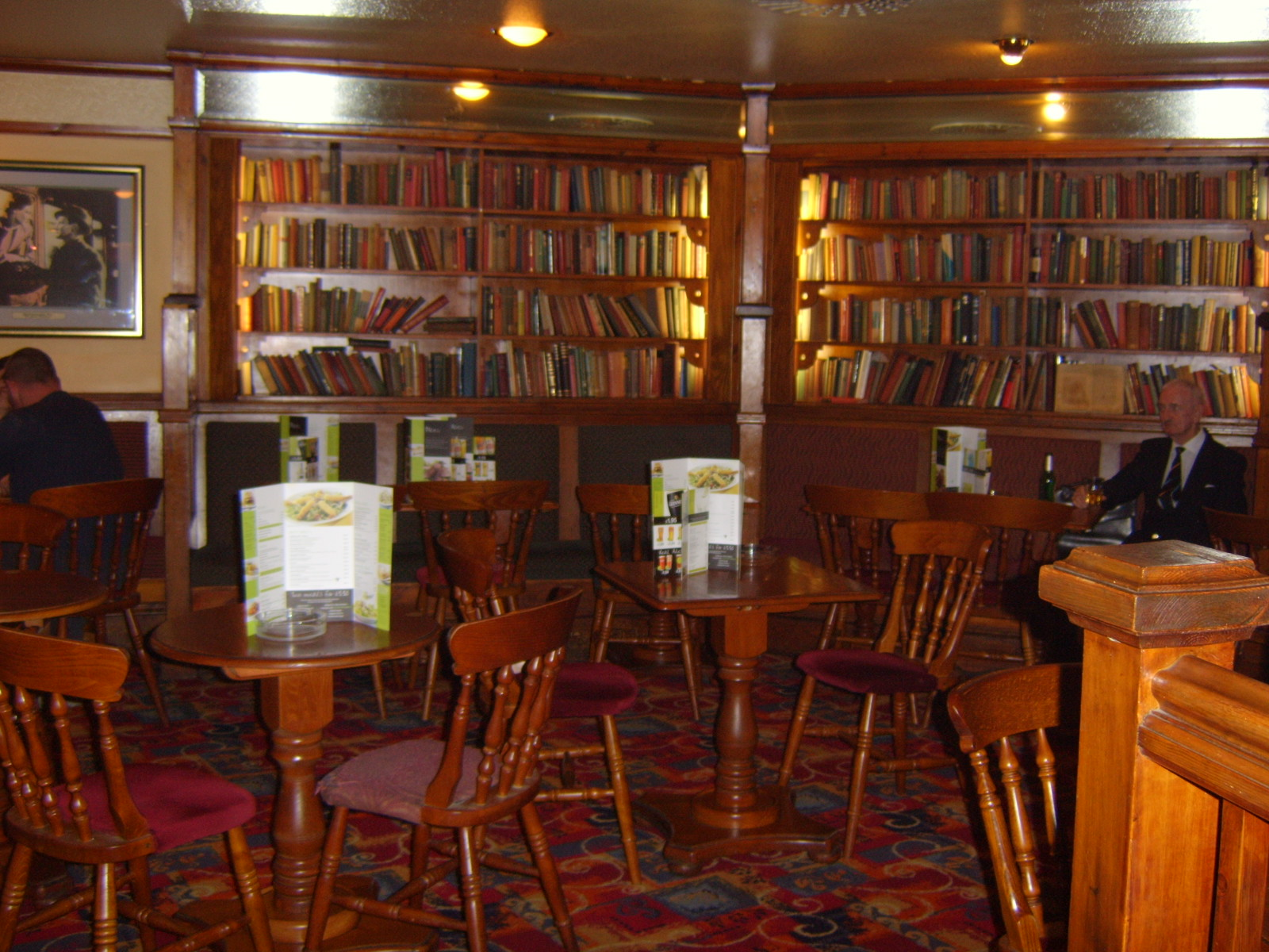 Pubbelső valahol Angliában